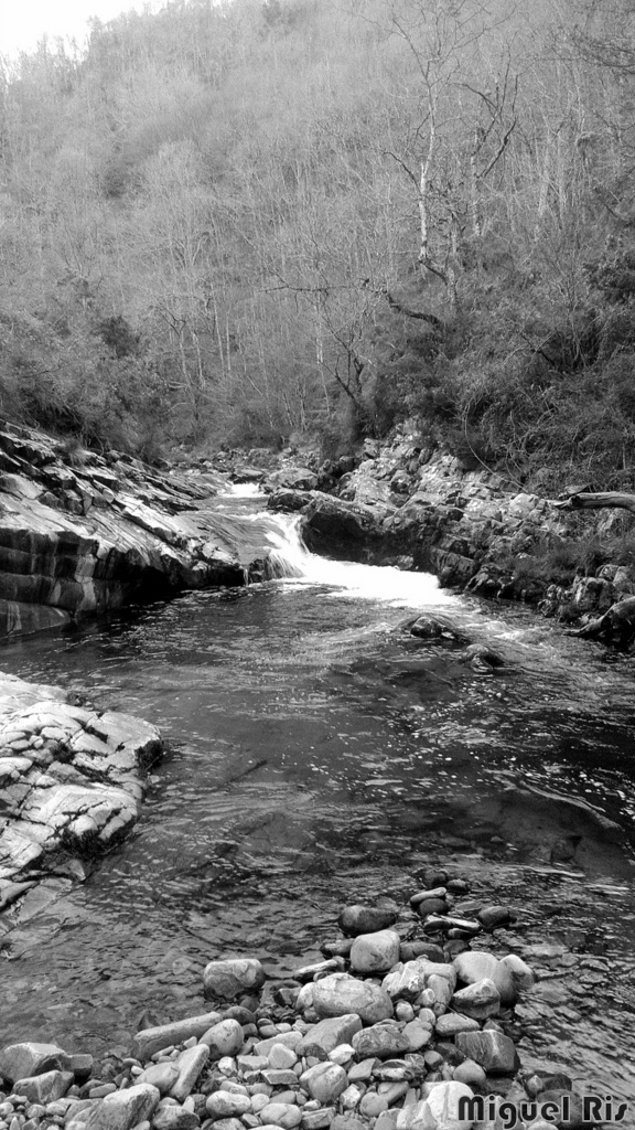 Ríu Porcía a su paso por Puente Lagar